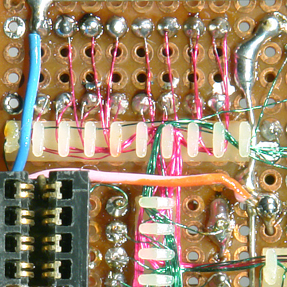 Fädeltechnik: Platine mit Fädelstift verdrahtet